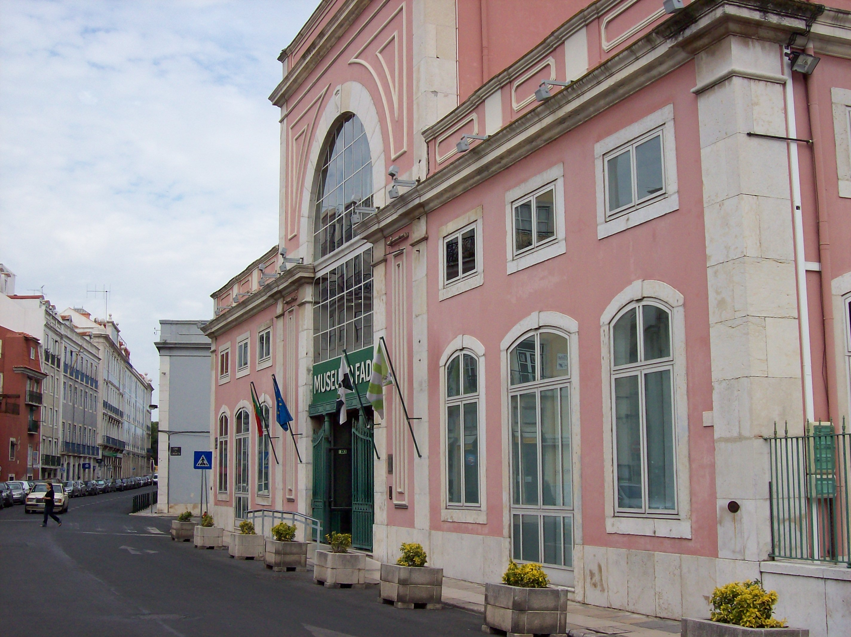 Museu do Fado (Fadomuseum) in Lissabon (Portugal).